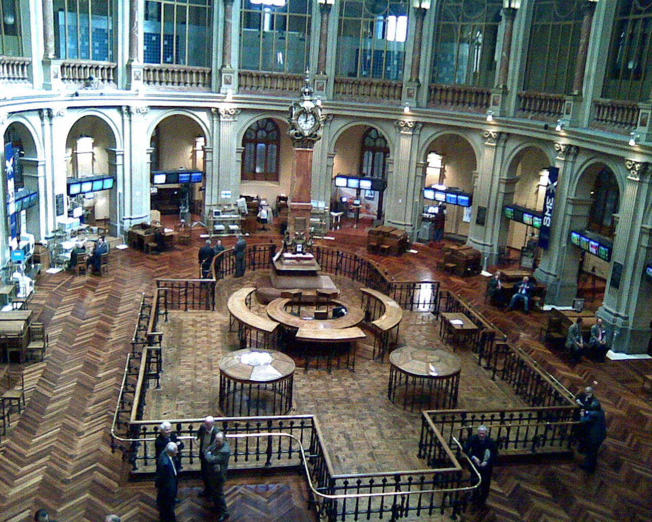 Interior de la Bolsa de Madrid.